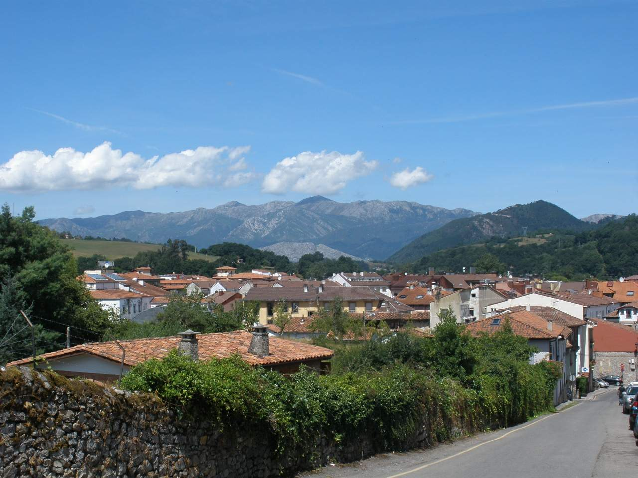 Cangas de Onís (Asturias).